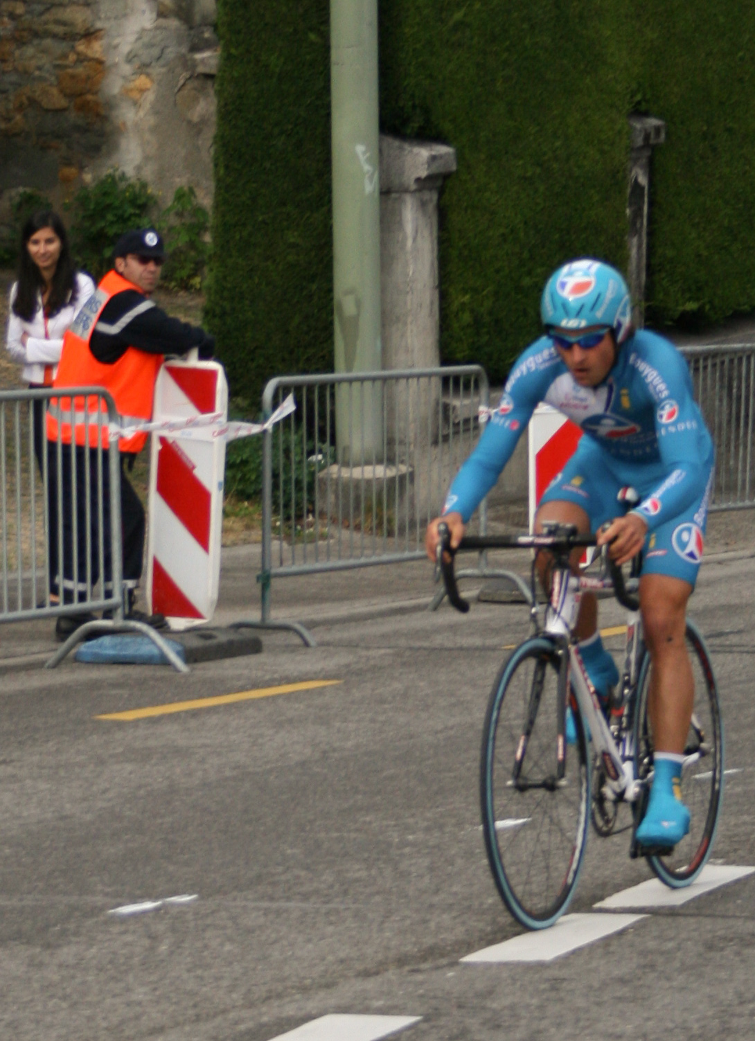 Pierre Drancourt prologue du Tour de Romandie 2007